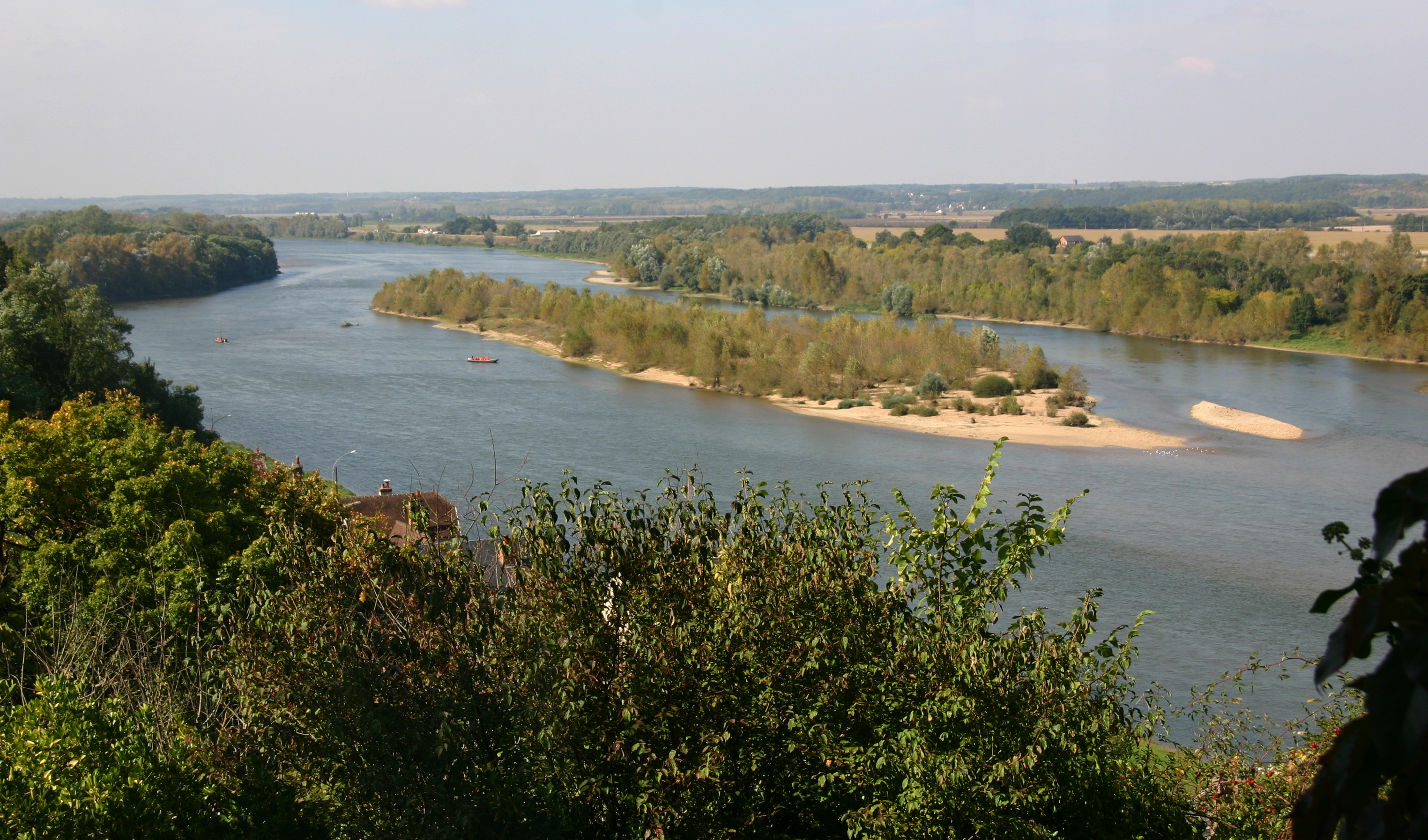 Loire bei Chaumont